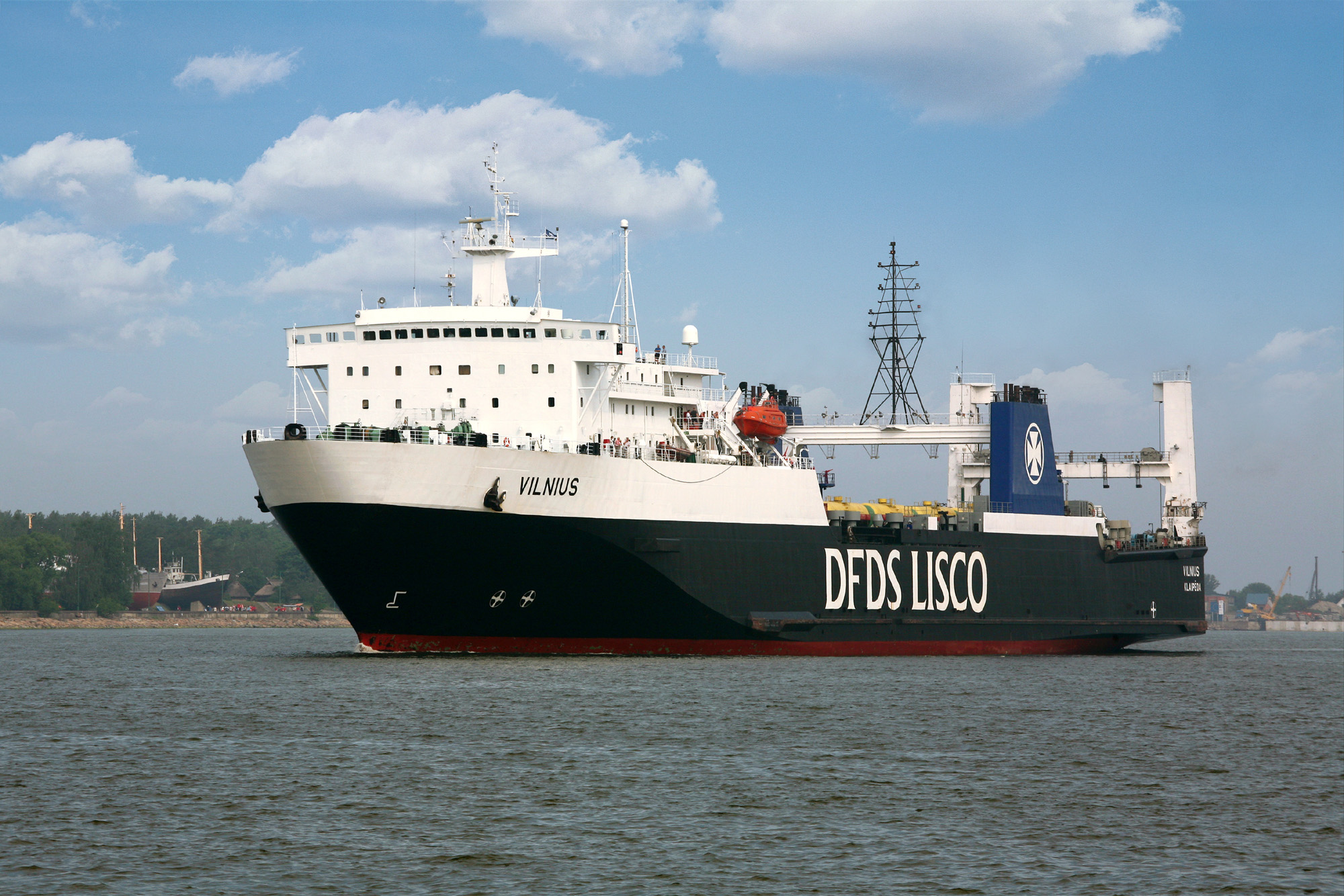 MS VILNIUS